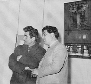 Copyright Copyright (c) 2004-2006 Sebastiano Scanavino. È garantito il permesso di copiare, distribuire e/o modificare questo documento seguendo i termini della Licenza per Documentazione Libera GNU, Versione 1.1 o ogni versione successiva pubblicata dalla Free Software Foundation; con le Sezioni Non Modificabili ELENCARNE I TITOLI, con i Testi Copertina ELENCO, e con i Testi di Retro Copertina ELENCO. Una copia della licenza è acclusa nella sezione intitolata "Licenza per Documentazione Libera GNU" (en). Versione 1.1, Marzo 2000